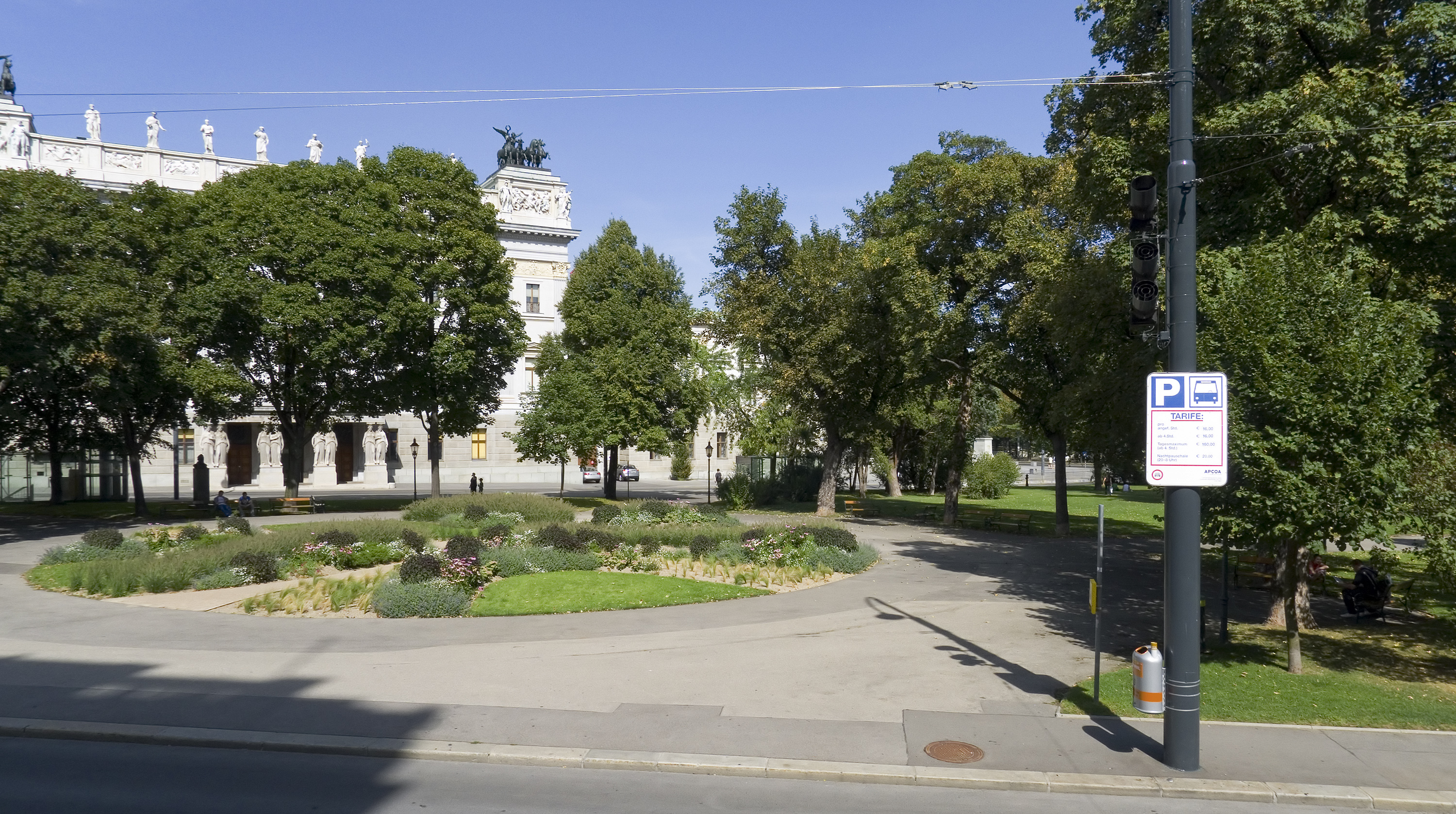 Schmerlingplatz in Wien 1 beim Grete-Rehor-Park Richtung Nordosten